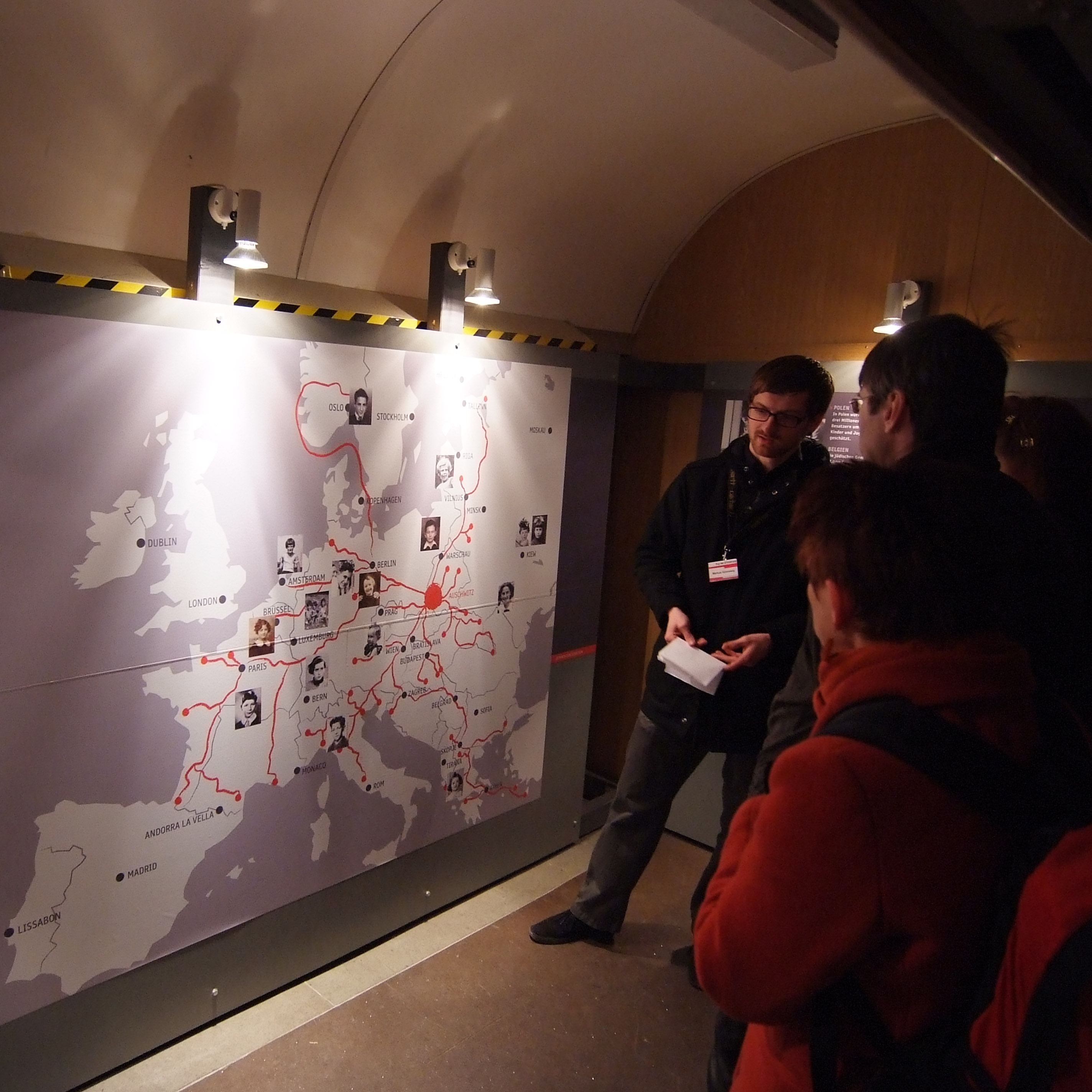 Zug der Erinnerung (Holocaust memorial train 2007/2008) in Kiel, 7-9 April 2008